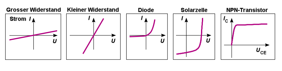 Qualitativer Vergleich der Kennlinien dreier Bauteile